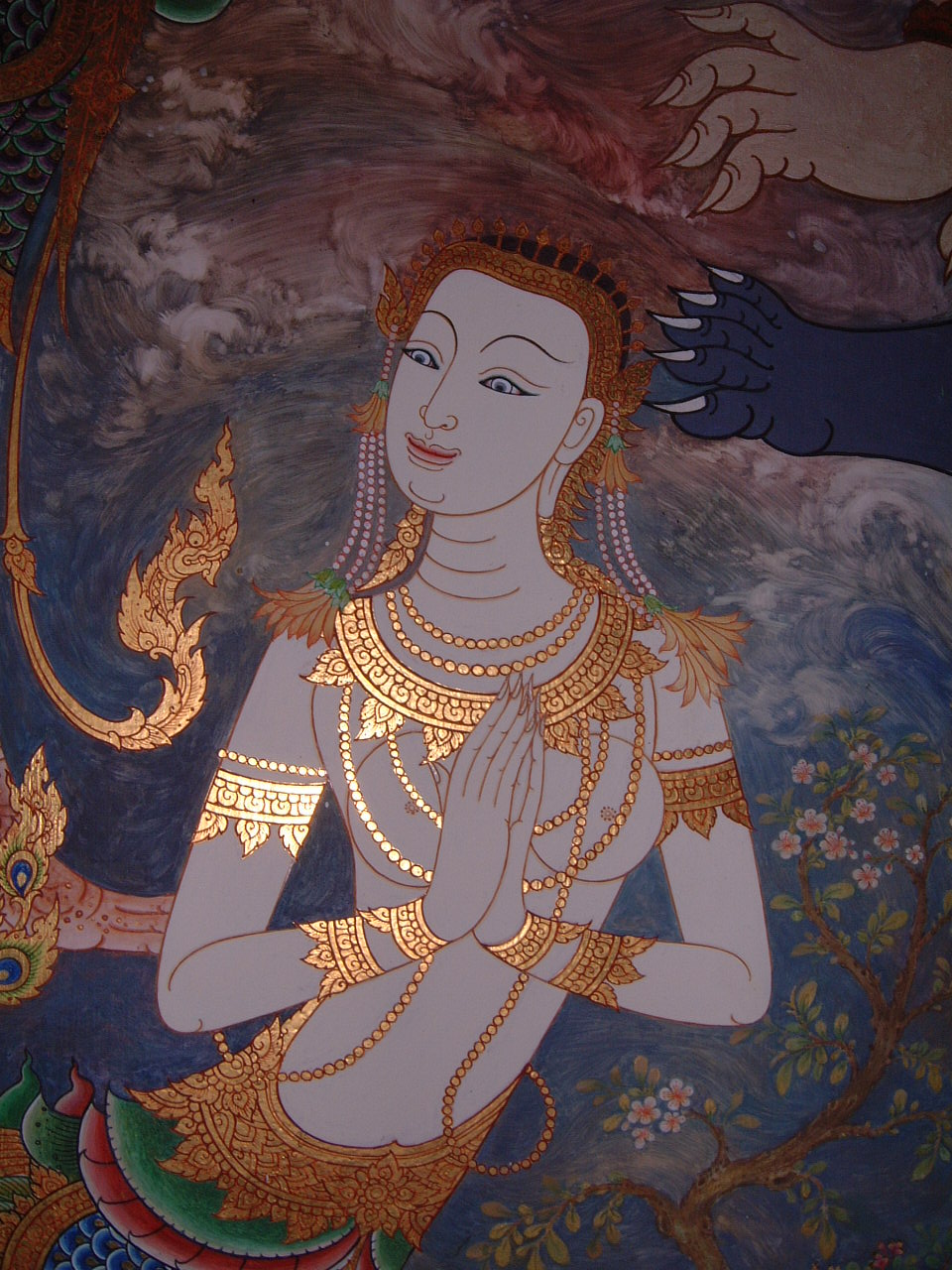 Wat Trithotsathep (วัดตรีทศเทพ วรวิหาร), Bangkok, Thailand - กินรี